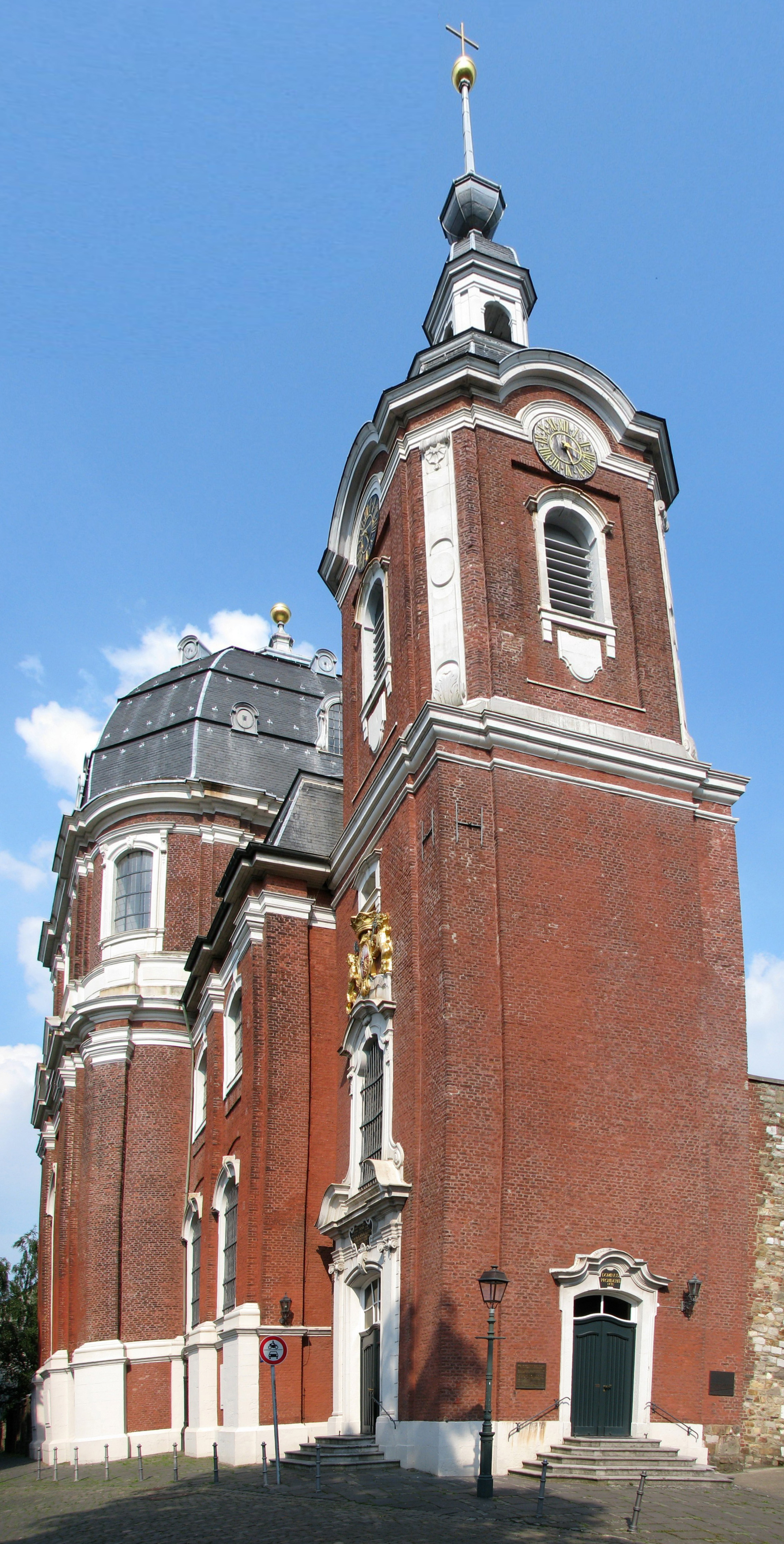 Pfarrkirche St. Johann-Baptist (Aachen)